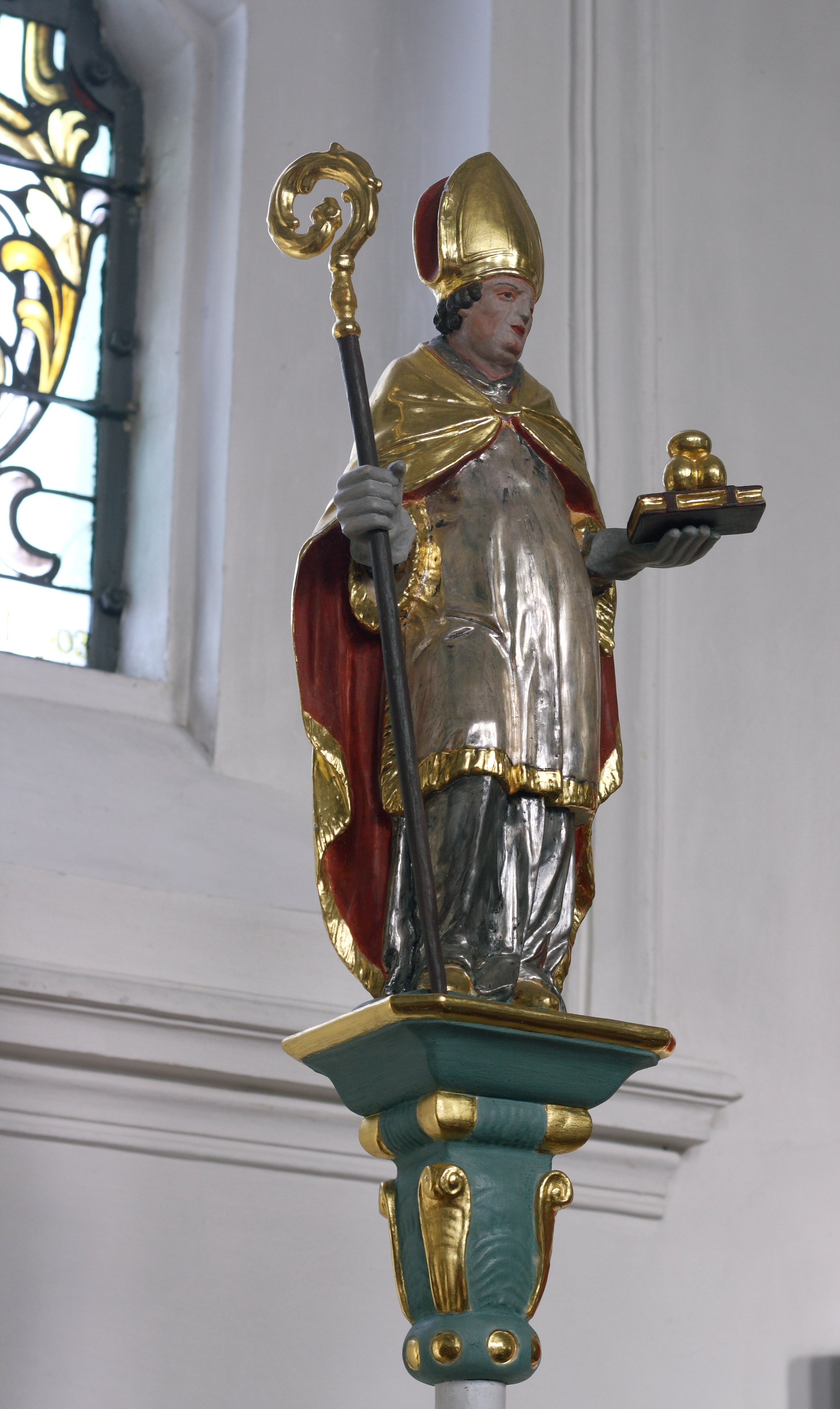 Katholische Pfarrkirche St. Nikolaus in Oberndorf am Lech, einer Gemeinde im Landkreis Donau-Ries (Bayern), Figur des hl. Nikolaus auf einer Prozessionsstange